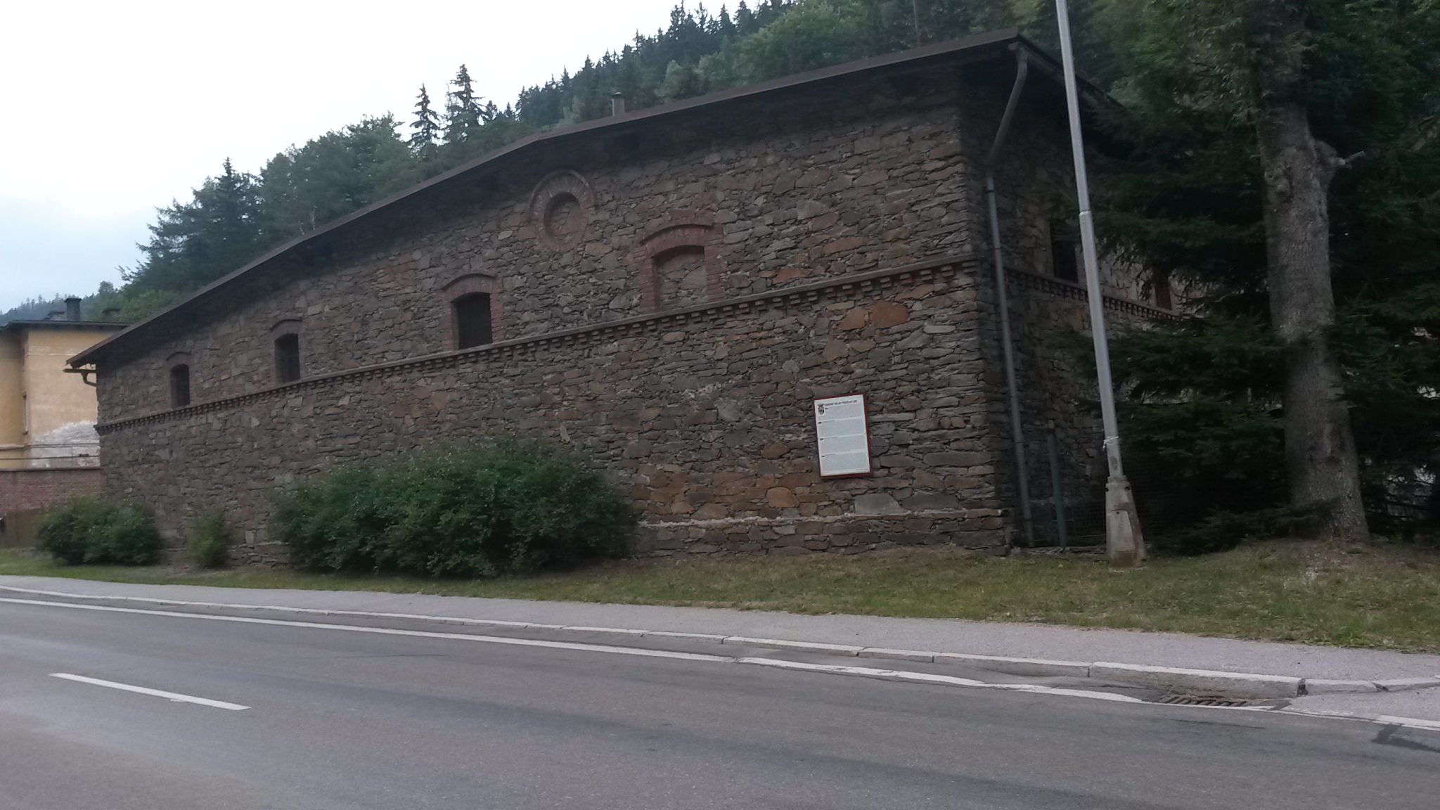 Sklad přádelny lnu